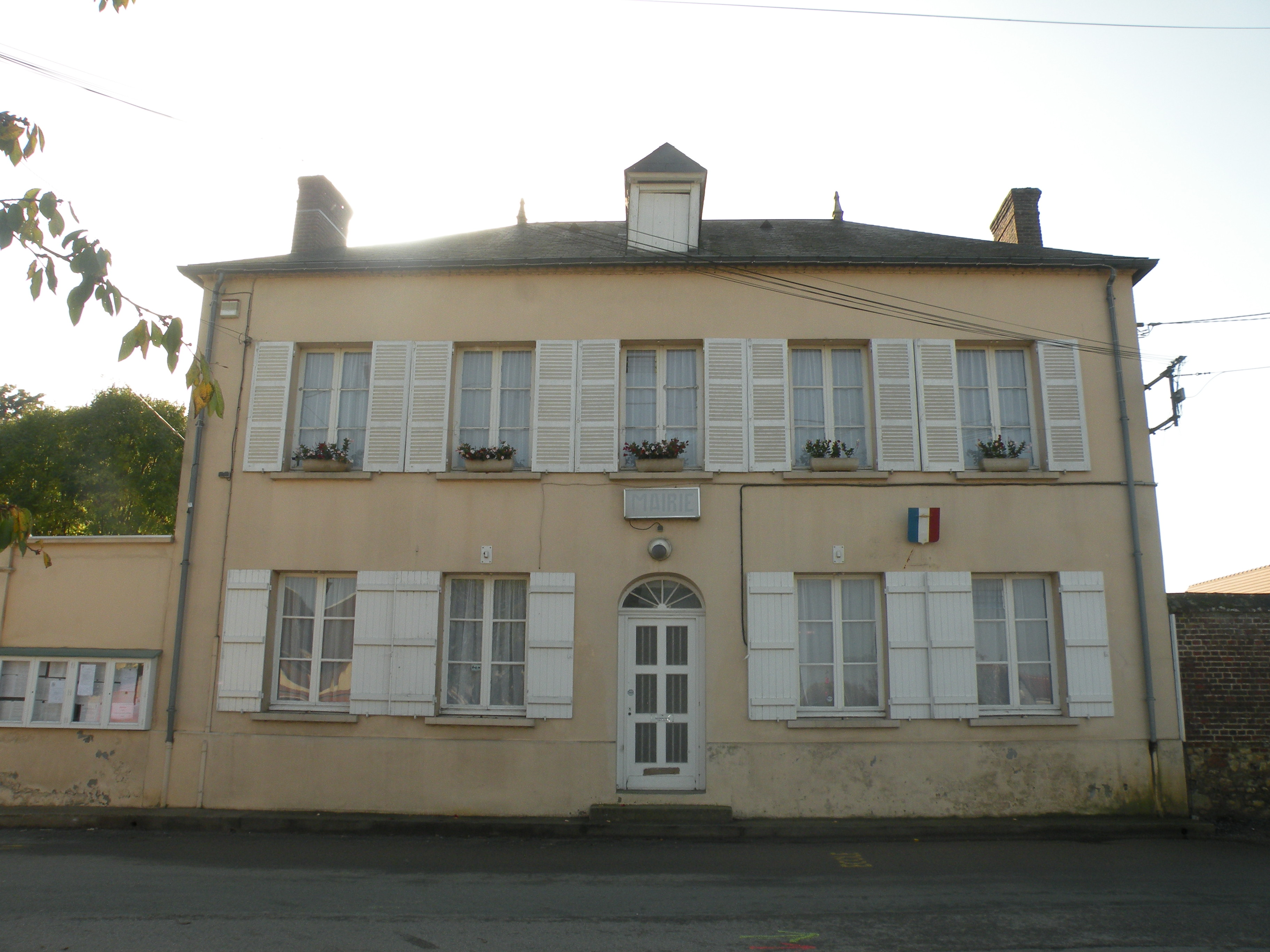 mairie de Herchies